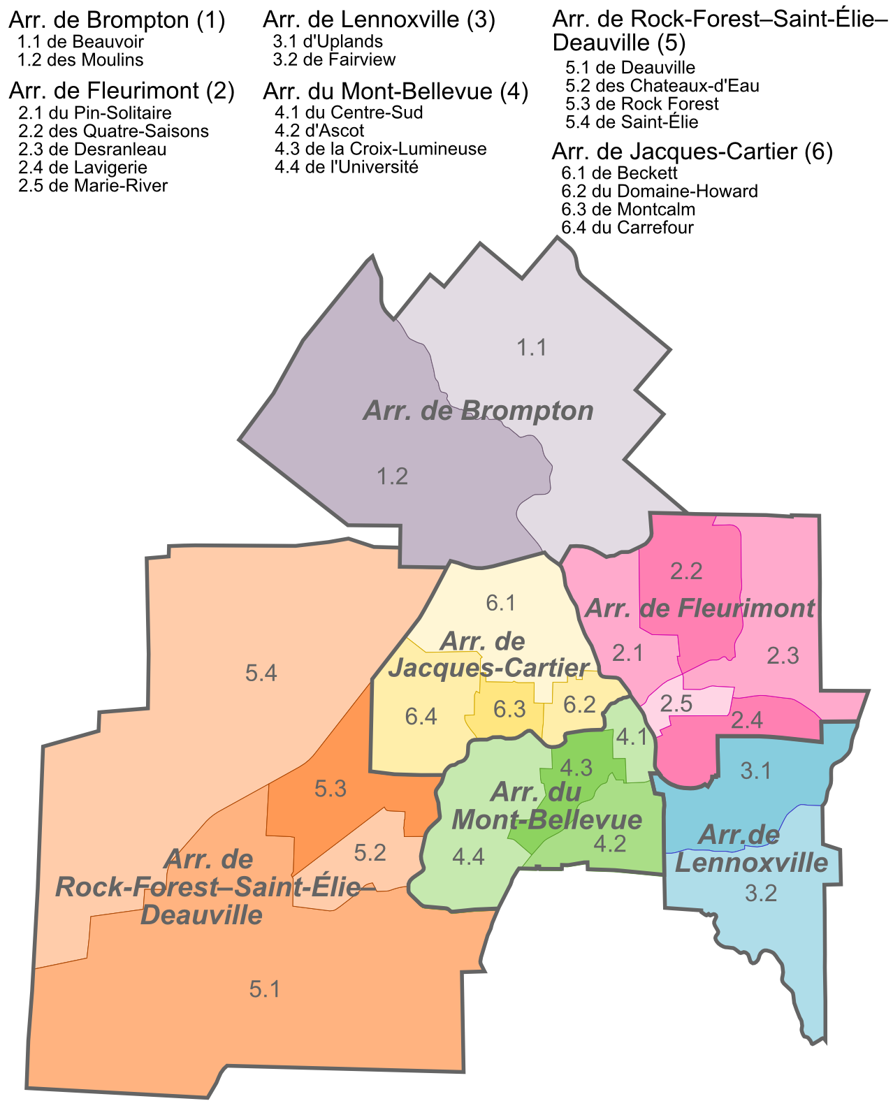 Carte géopolitique de Sherbrooke